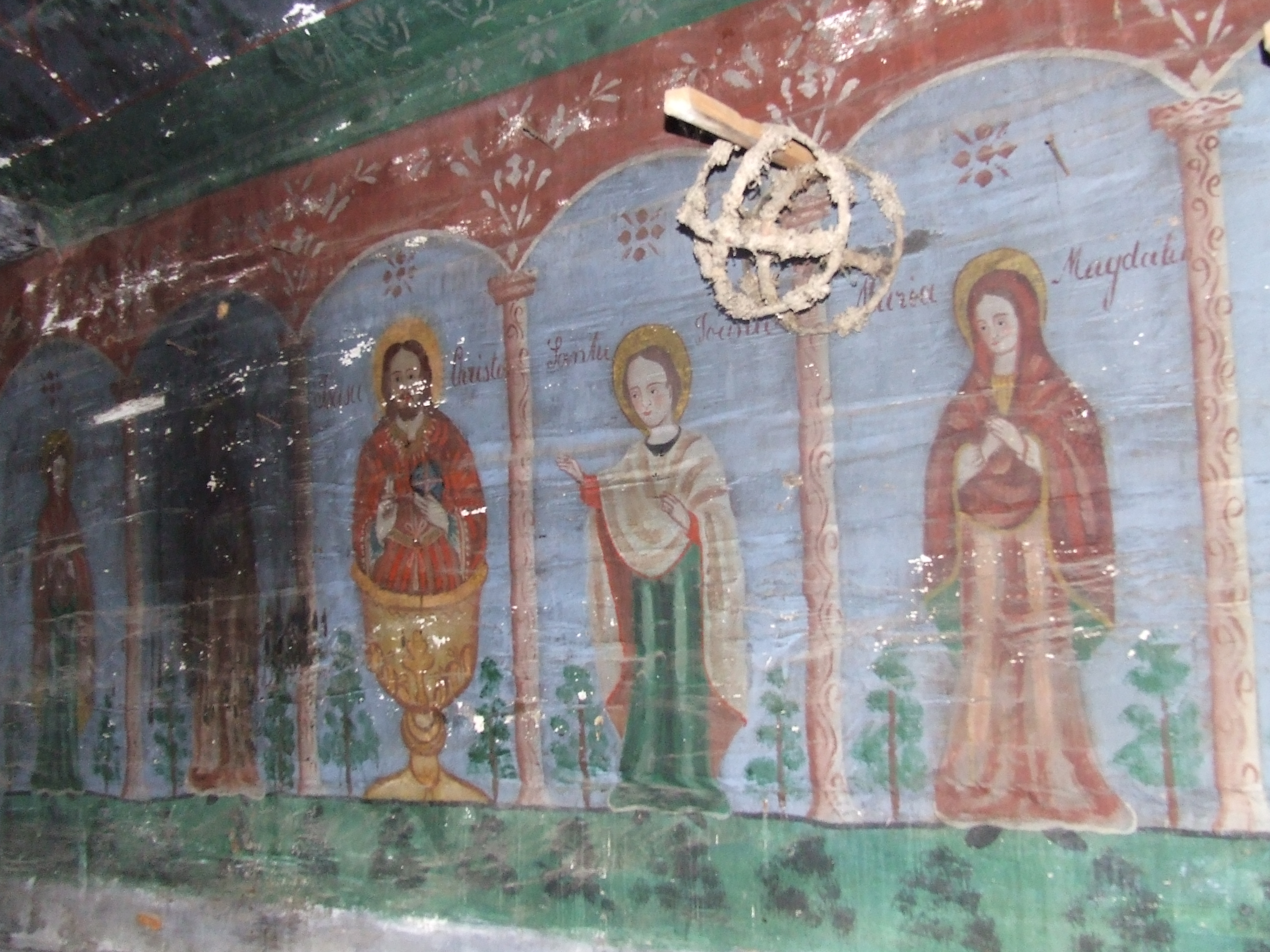 Biserica de lemn din Valea Crişului, judeţul Bihor. Pictură din altar.